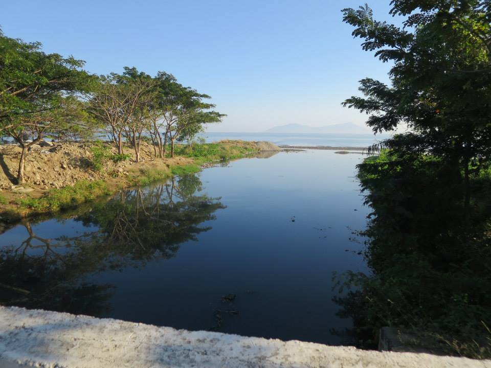 Dili, East Timor